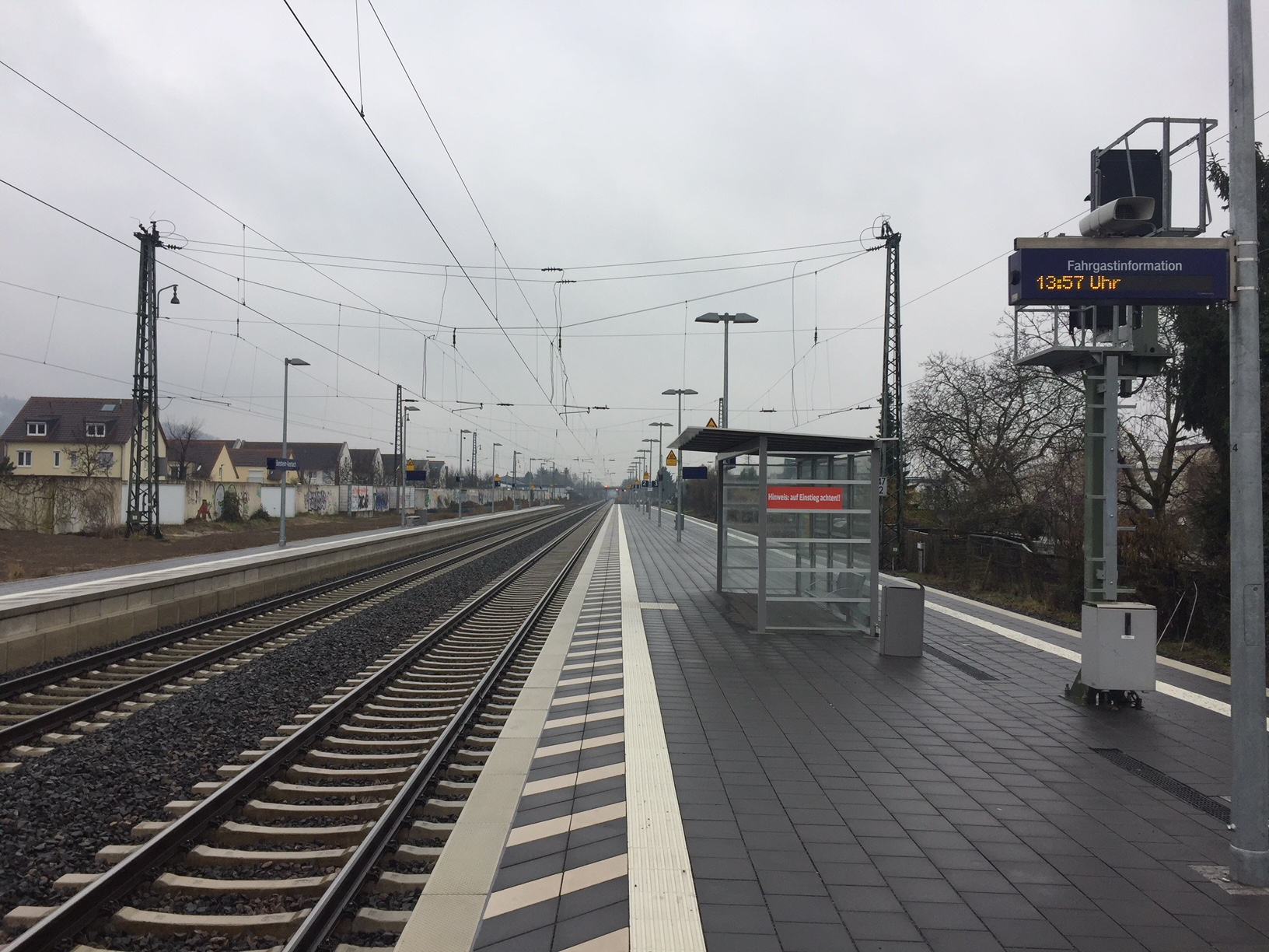 Gleis 1 und 2 auf dem Bahnhof Bensheim-Auerbach (März 2018)